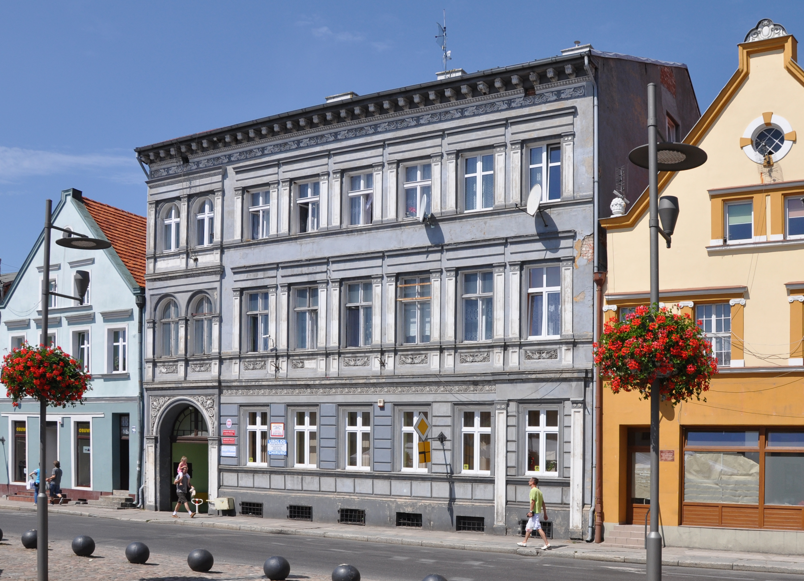 Dom nr 15 przy Rynku w Trzebiatowie.